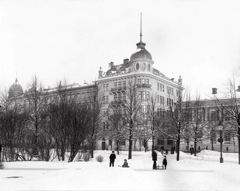 Hernösands enskilda bank, Kungsträdgårdsgatan 16 i hörnet av Näckströmsgatan vintertid.